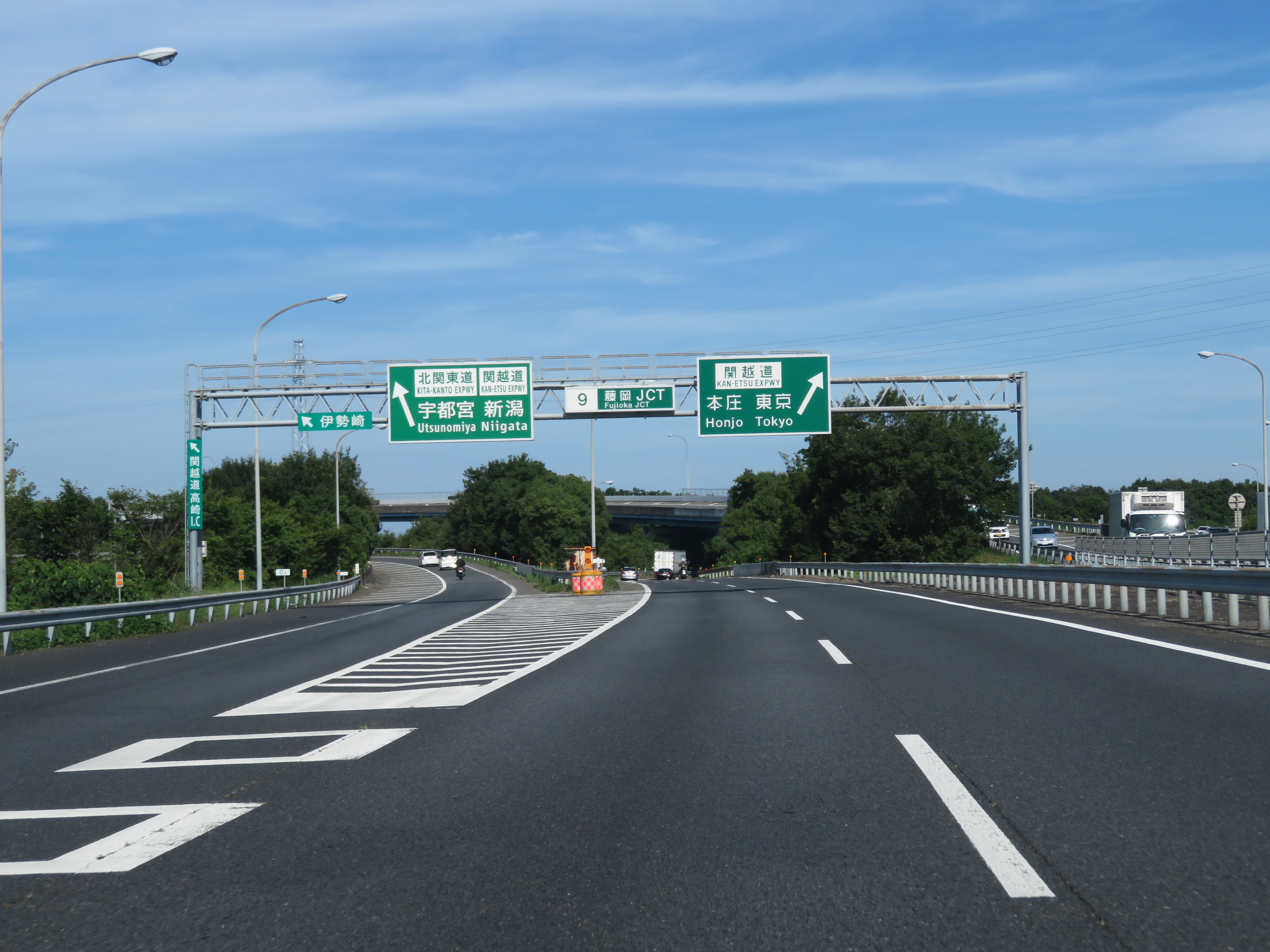 上信越自動車道藤岡ジャンクション関越自動車道方面分岐付近 Canon PowerShot SX720 HS